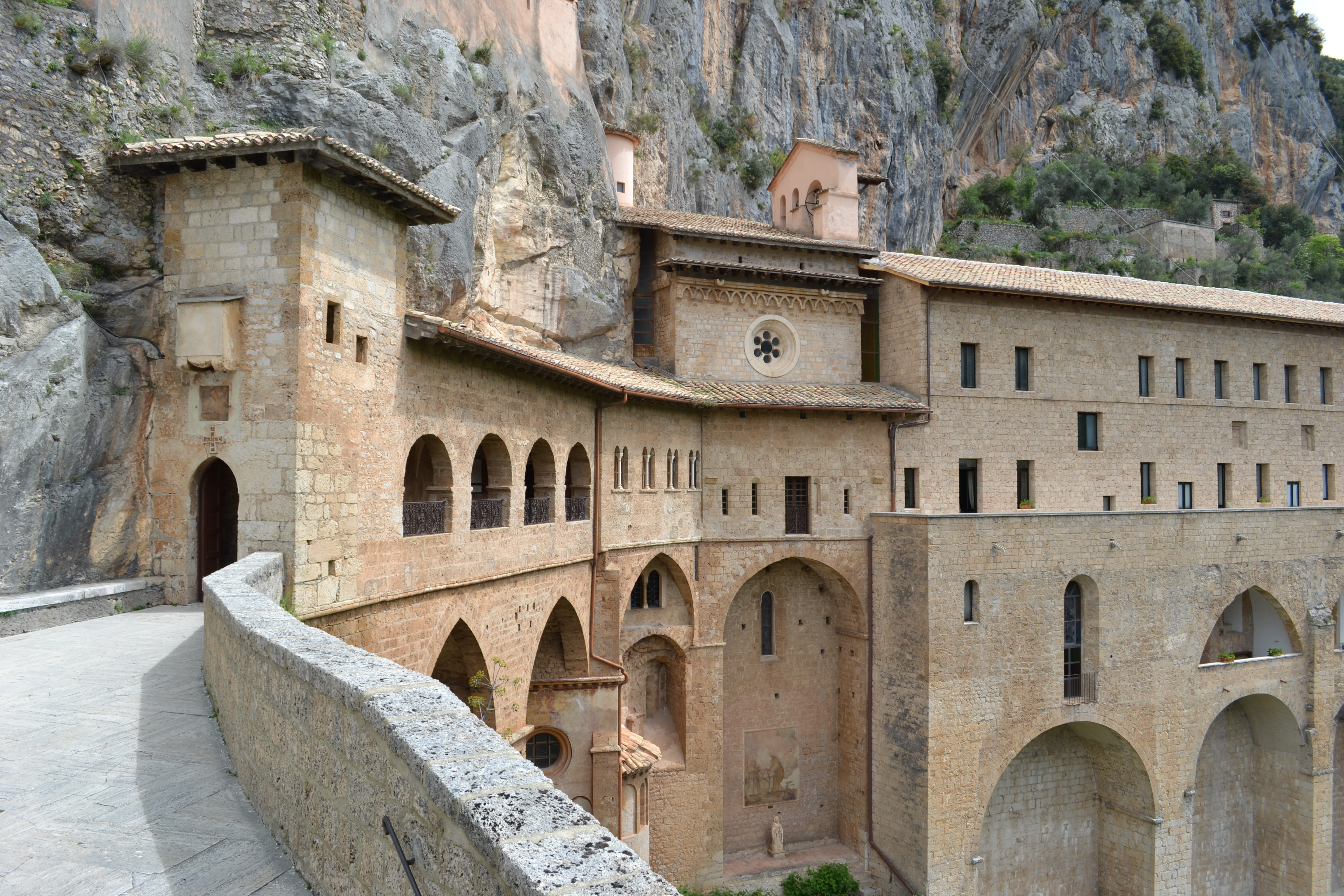 Il monastero sorge intorno alla grotta dove Benedetto visse tre anni da eremita.